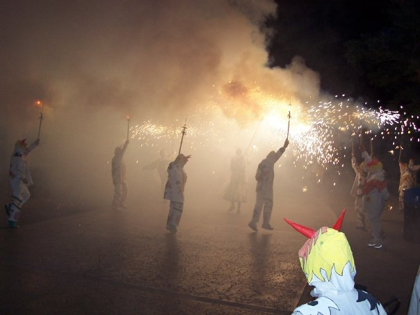 Actuación de los Diablos Malditos de Salou